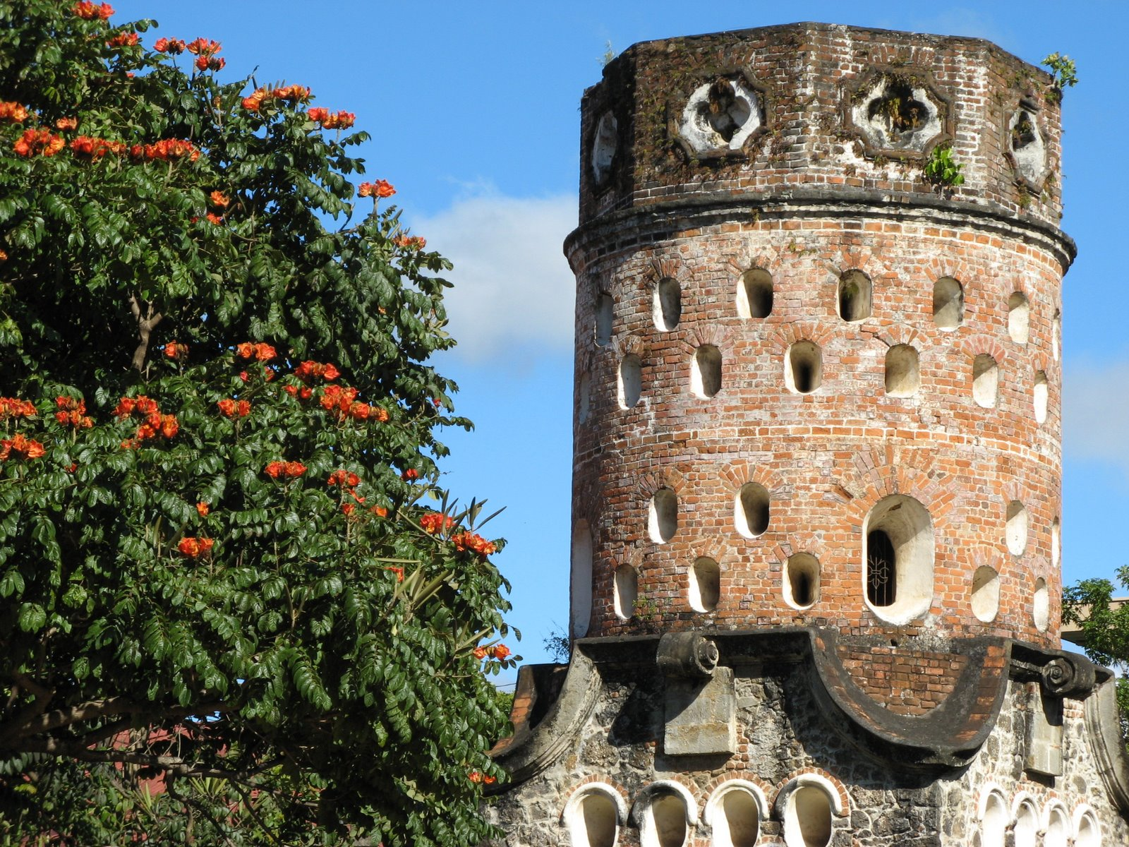 Heredia, Costa Rica